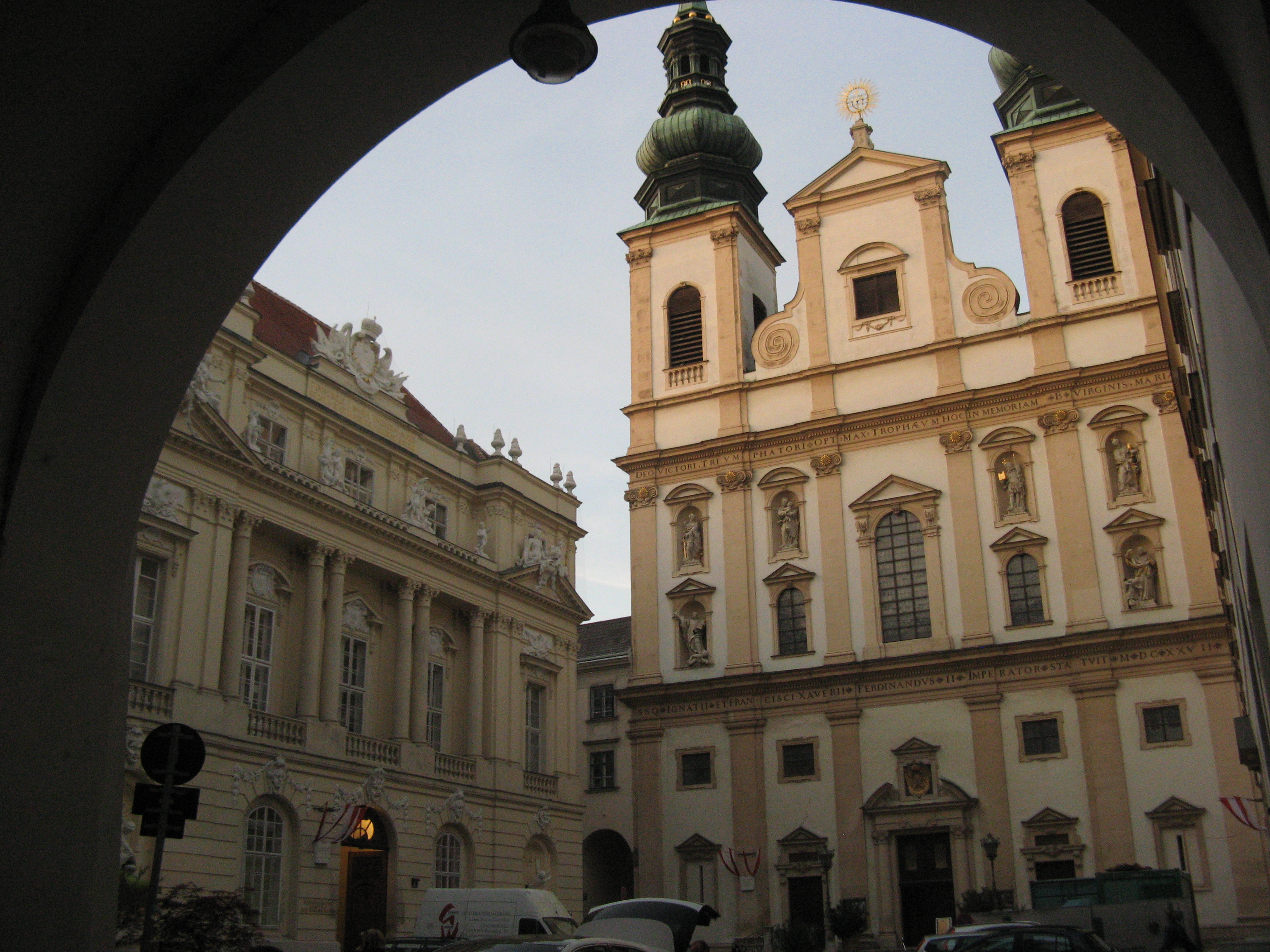 Akademie der Wissenschaften und Jesuitenkirche, Dr.-Ignaz-Seipel-Platz, Wien-Innere Stadt